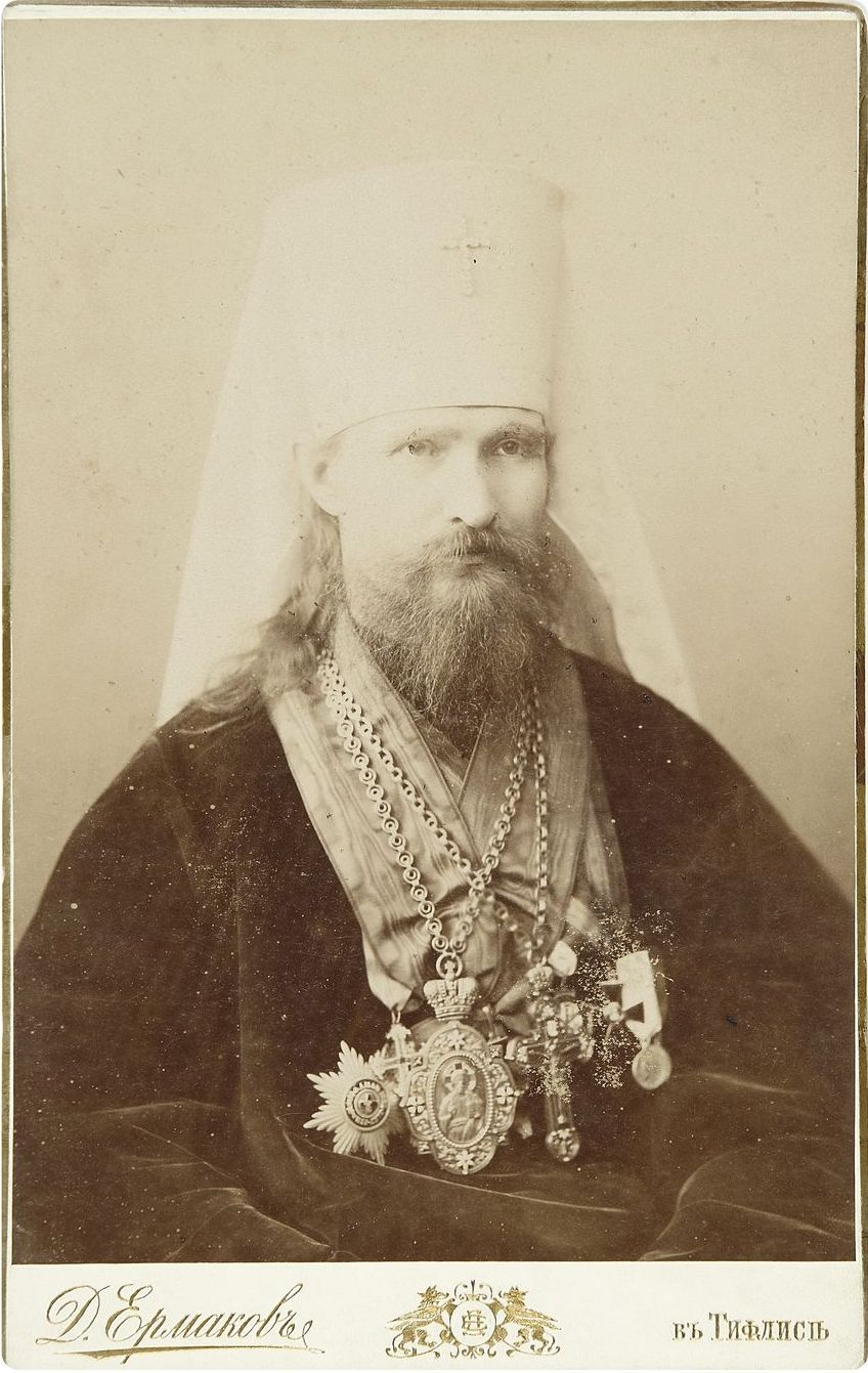 Митрополит Владимир (Богоявленский)